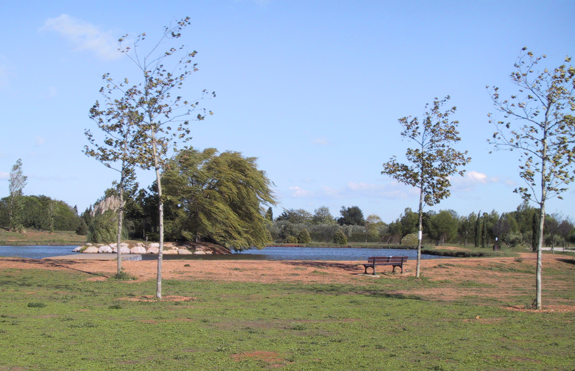 Vue du parc municipal de Garons et de son plan d'eau. J'ai pris cette photo moi-même le 26 septembre 2006. Elle a été recadrée et a subie une correction chromatique.